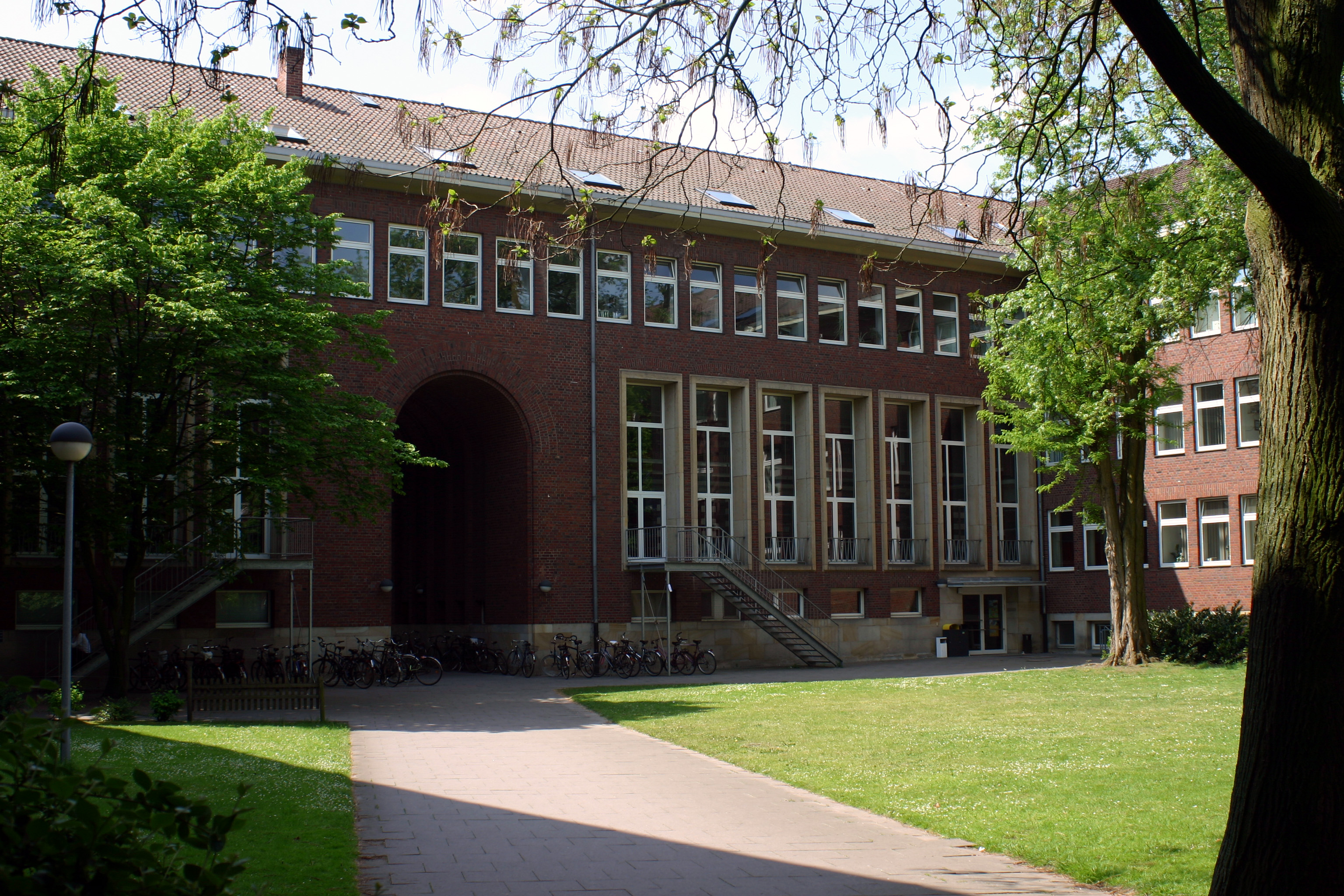 Innenhof des Juridikums This image shows a heritage building in Germany, located in the North Rhine-Westphalian city Münster.